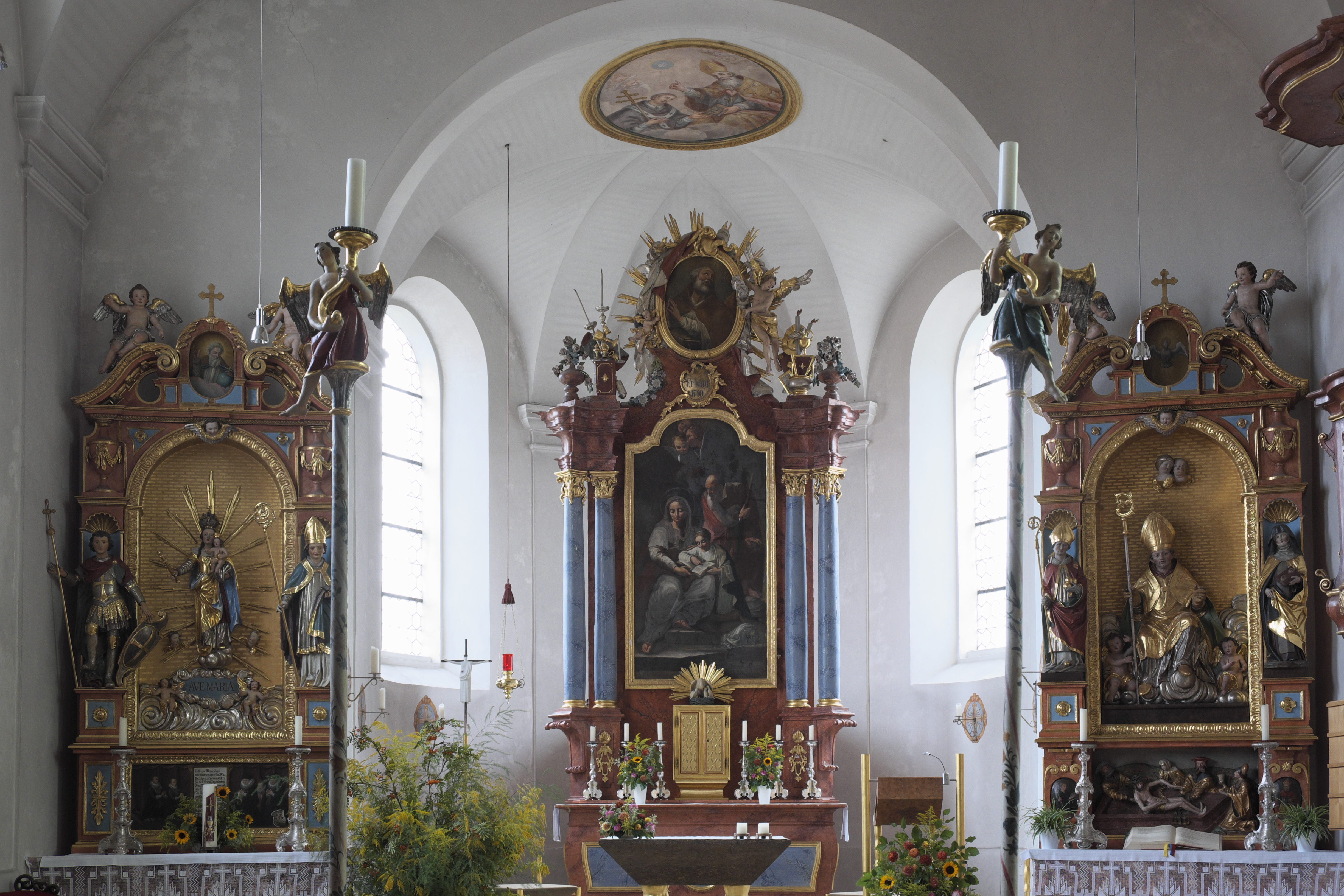 Katholische Filialkirche St. Ulrich in Wangen bei Starnberg im Landkreis Starnberg (Bayern/Deutschland), Innenraum